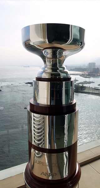 Supercopa de Chile